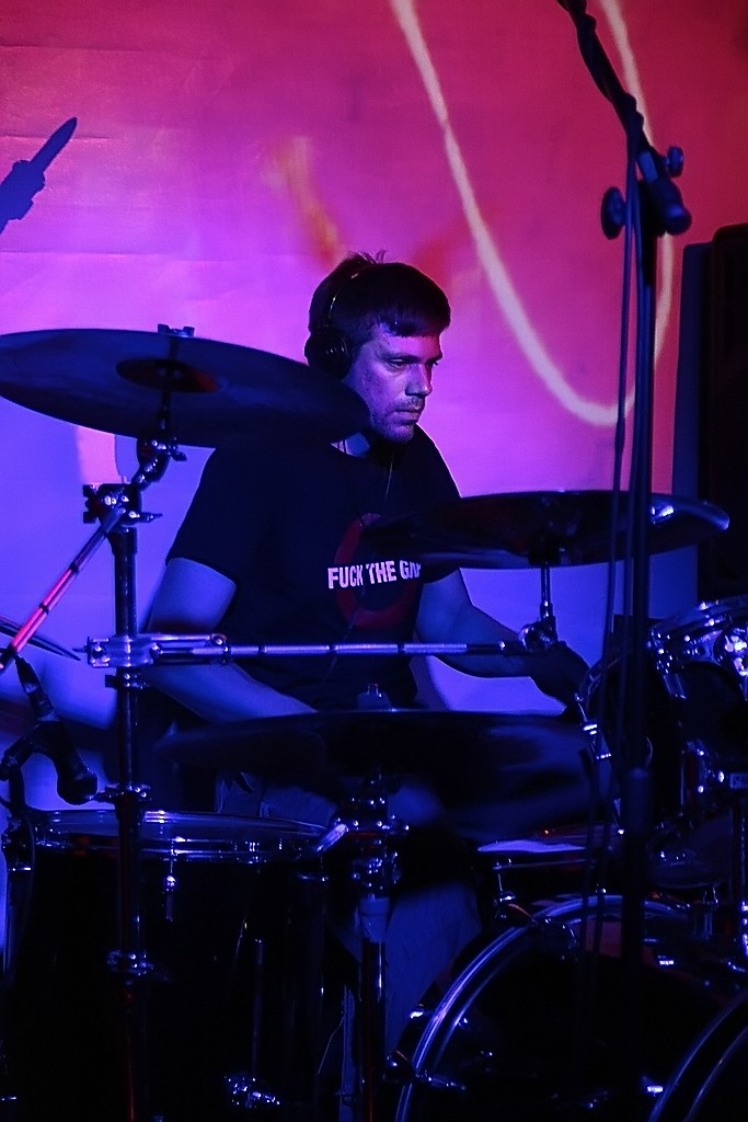 Thesis - Paweł Stanikowski